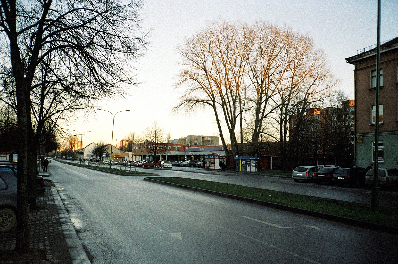 Naikupės gatvė / Naikupės street, Klaipėda